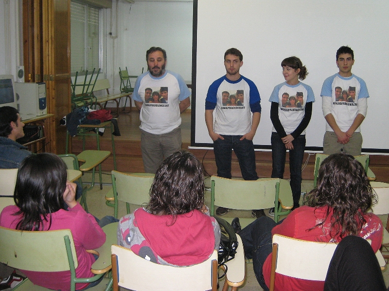 Ignacio Vilar, Rubén Riós, Tamara Canosa e Roberto Porto presentando a película Pradolongo no I.E.S. Manuel García Barros da Estrada. Realizada co permiso dos fotografados.